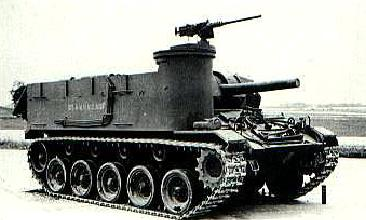 105mm Howitzer Motor Carriage M37 at Aberdeen proving ground